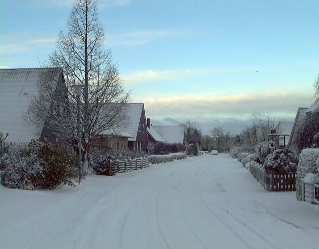 Typische Wohnsiedlung in Osteel (Osteeler Campen) (Selbst fotografiert)